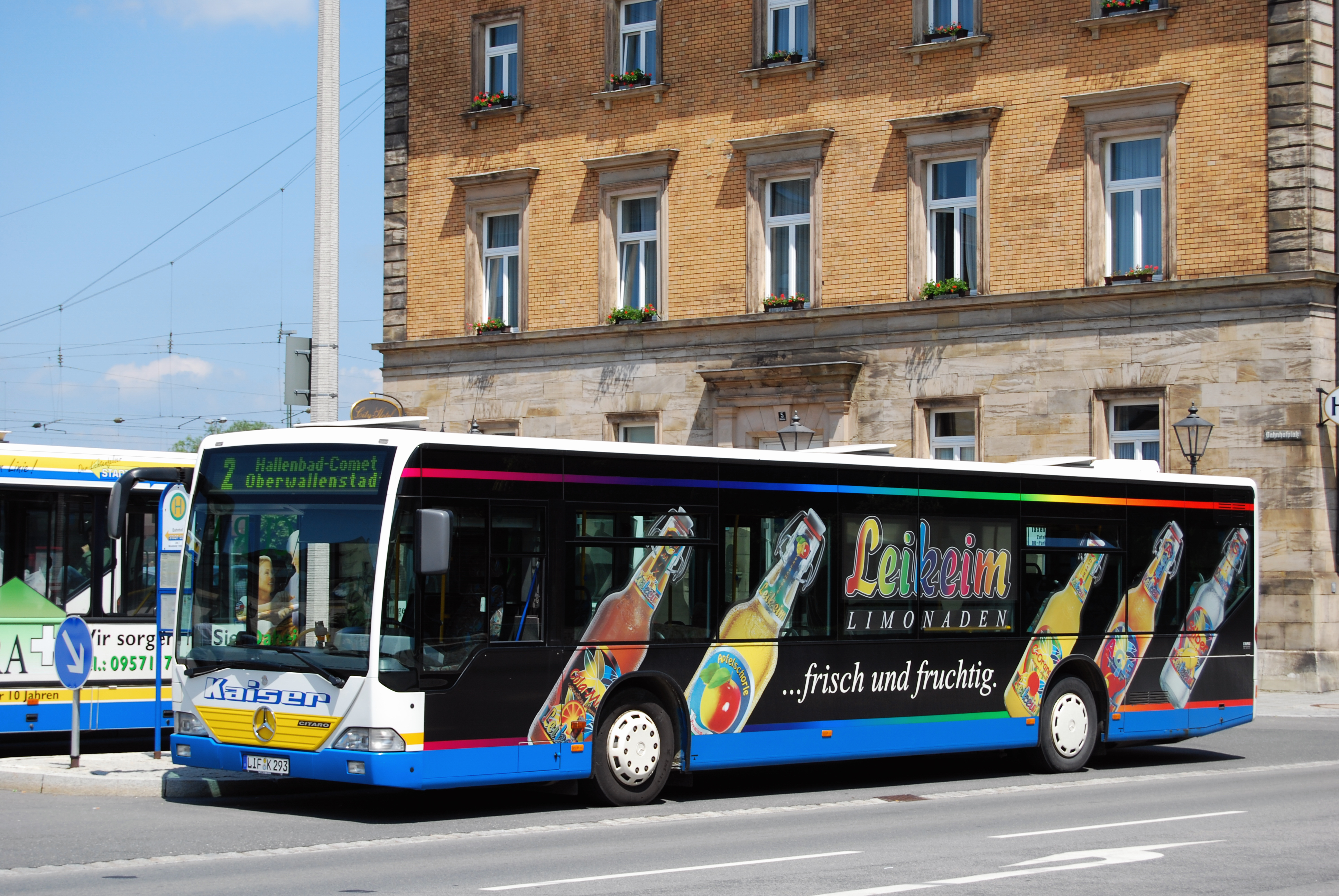 Citaro der Fa. Kaiser im Stadtverkehr Lichtenfels am Lichtenfelser Bahnhof